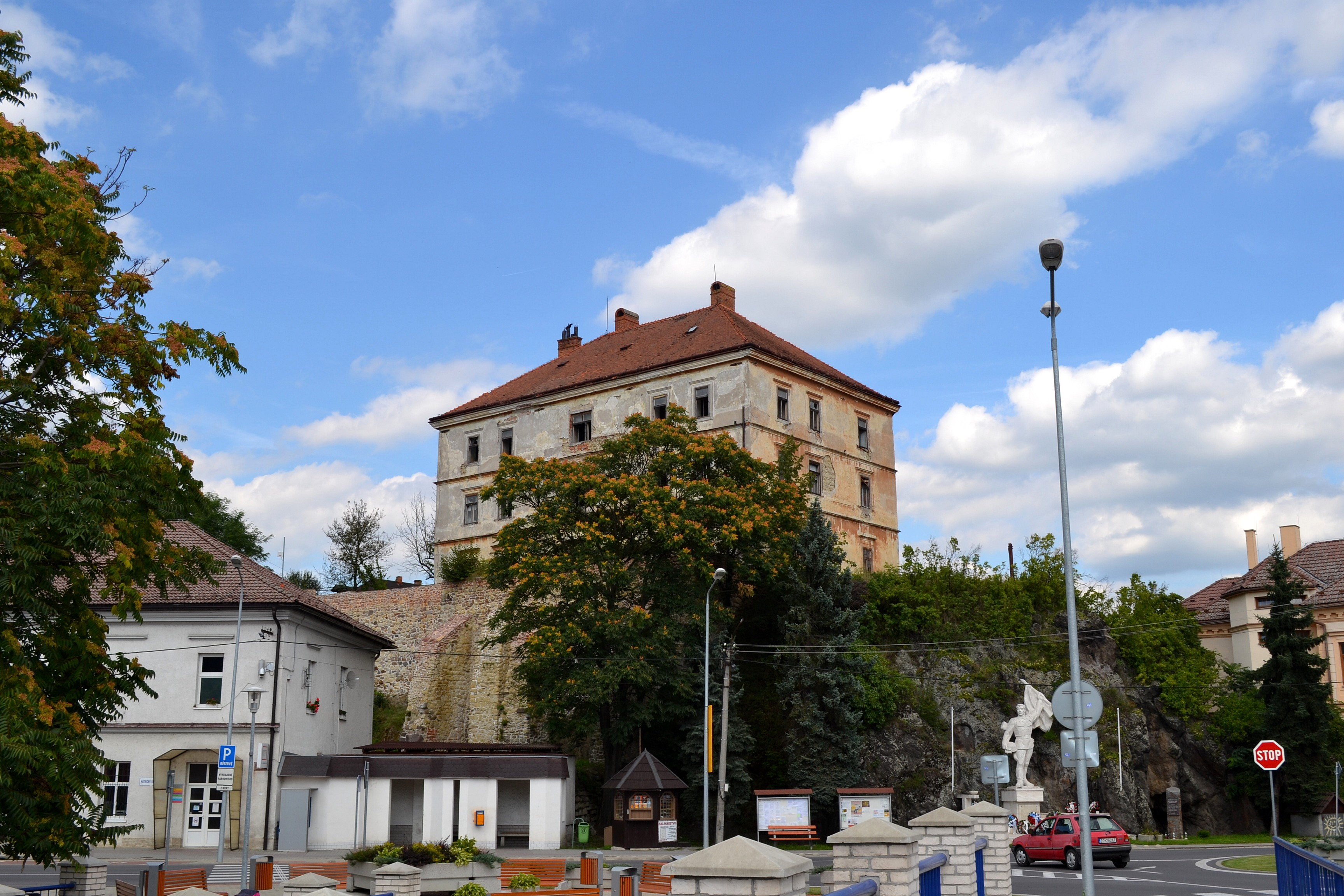 Gotická stavba kaštieľa z 15. stor. na vyvýšenine nad centrom mesta